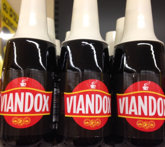 Viandox